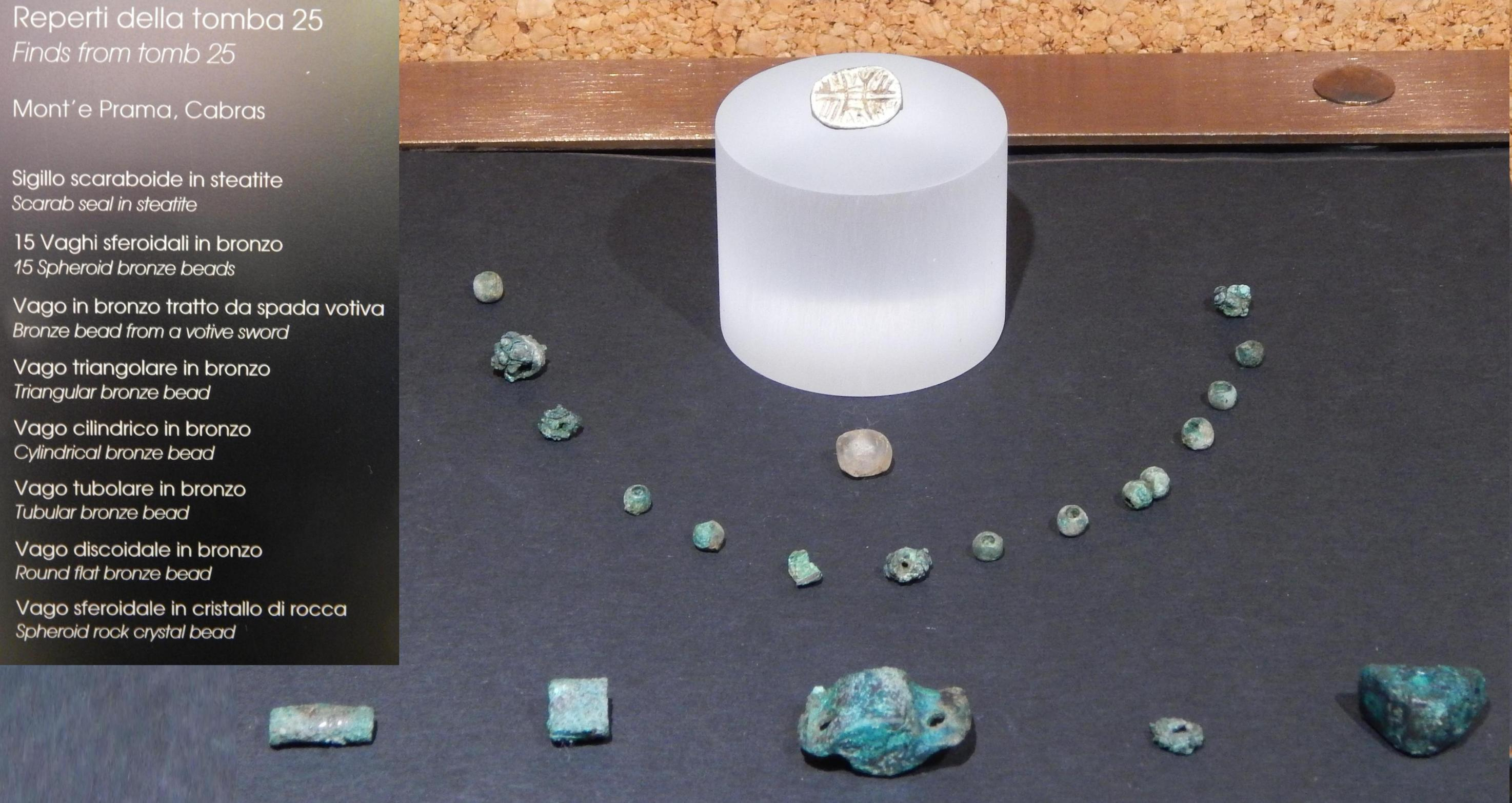 Reperti della tomba n.25 (Monte Prama)